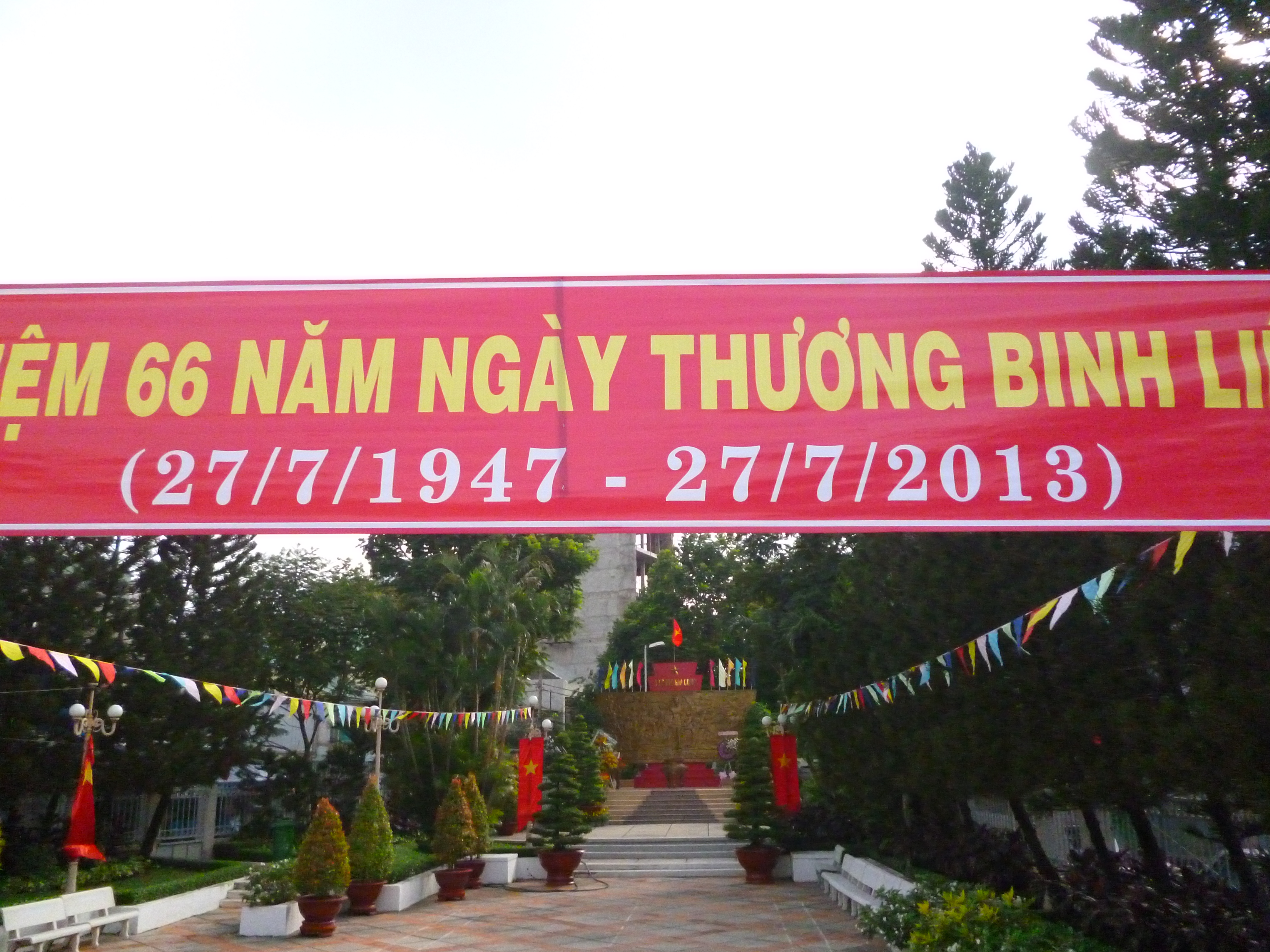 Hình chụp về khẩu hiệu kỷ niệm Ngày Thương Binh Liệt Sĩ tại Quận 3